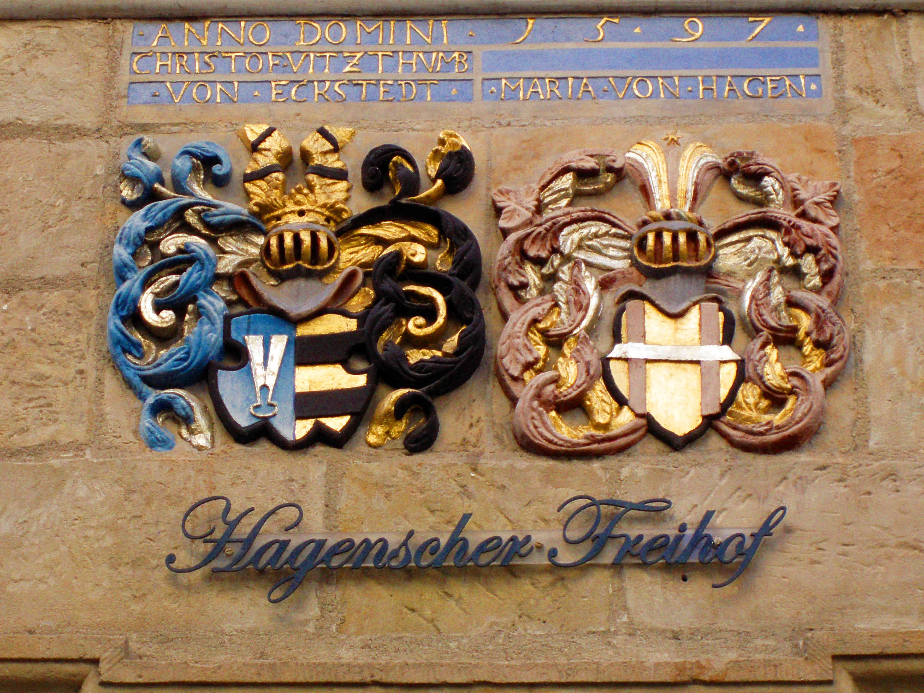 Wappen am Hagenschen Freihof in Quedlinburg